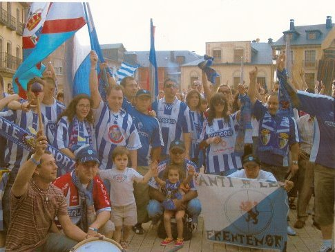 Miembros de la peña fútbolistica de la S. D. Ponferradina "Frente Norte" celebrando el ascenso de aquella a la 2ª División del fútbol español